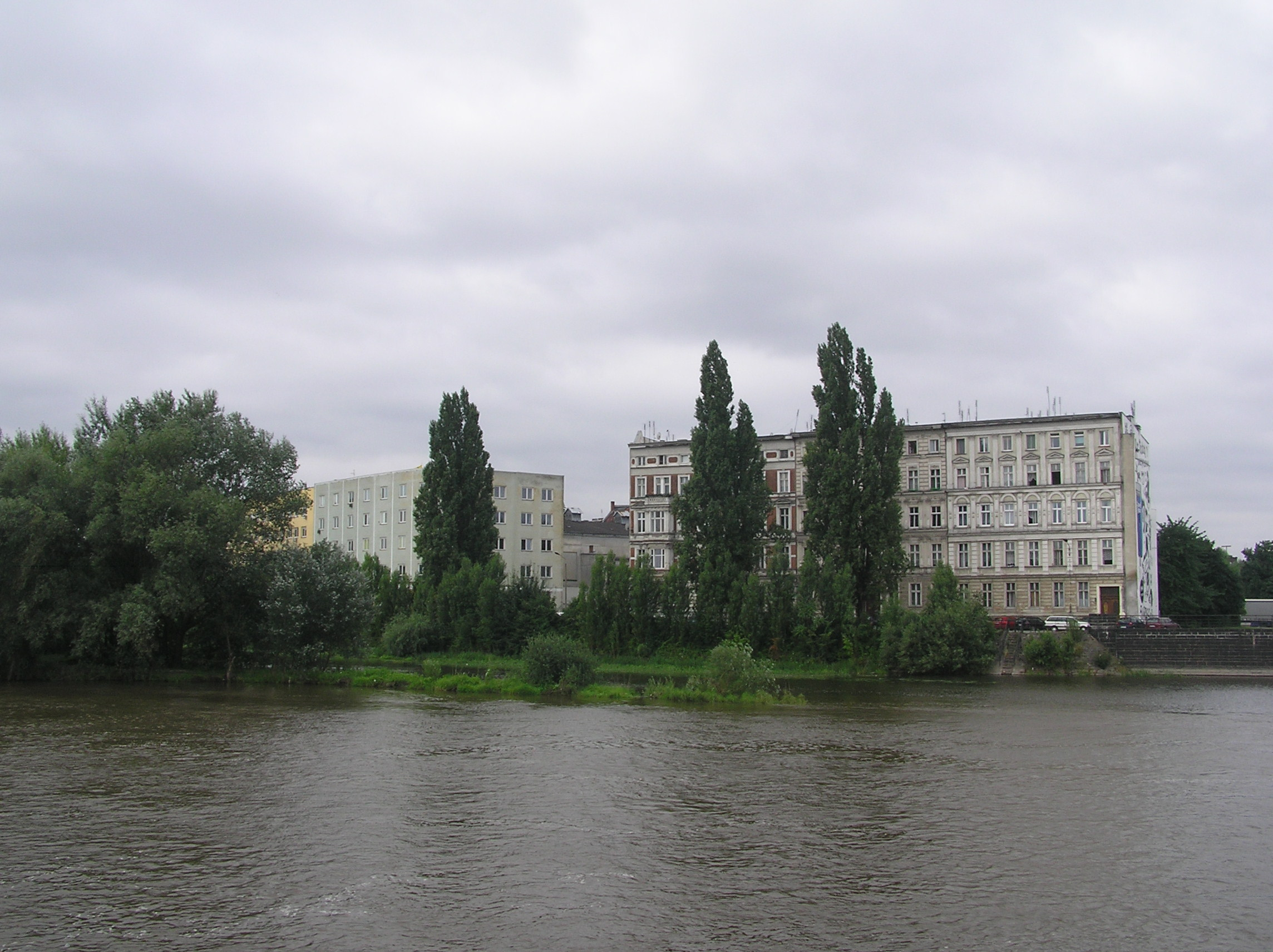 Ujście Oławy